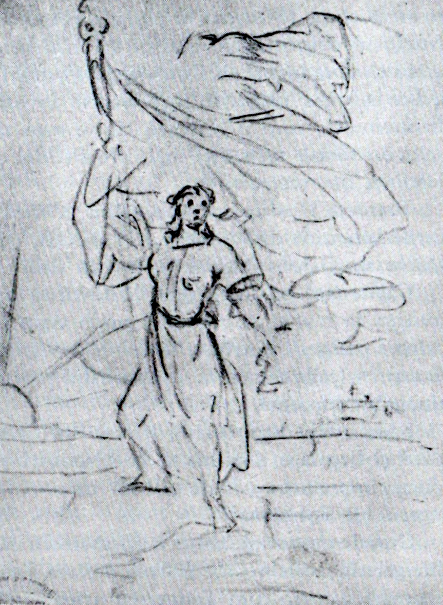 România Revoluționară, desen în creion, 0,21x0,16m - Muzeul Gheorghe Tattarescu